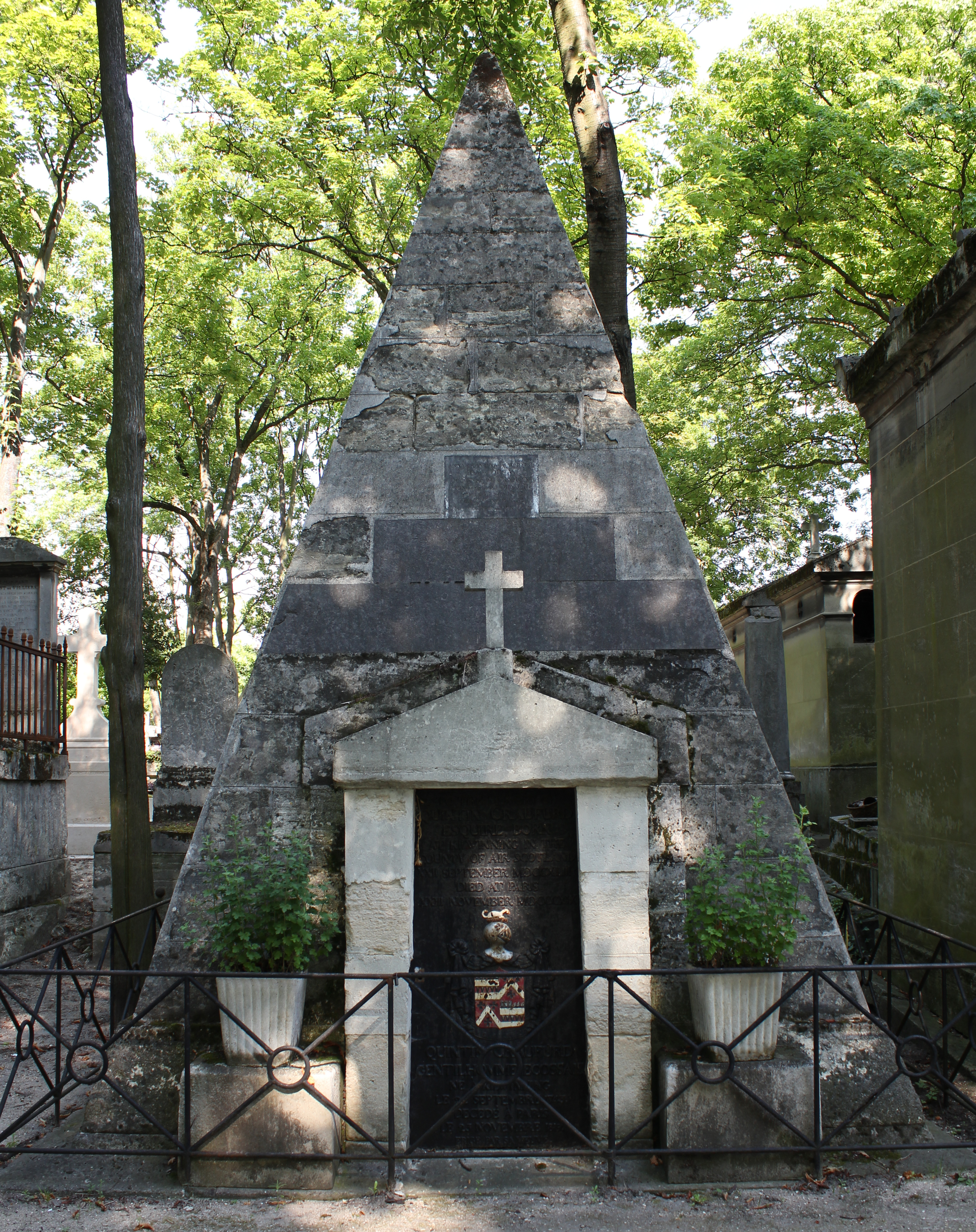 Vue d'ensemble